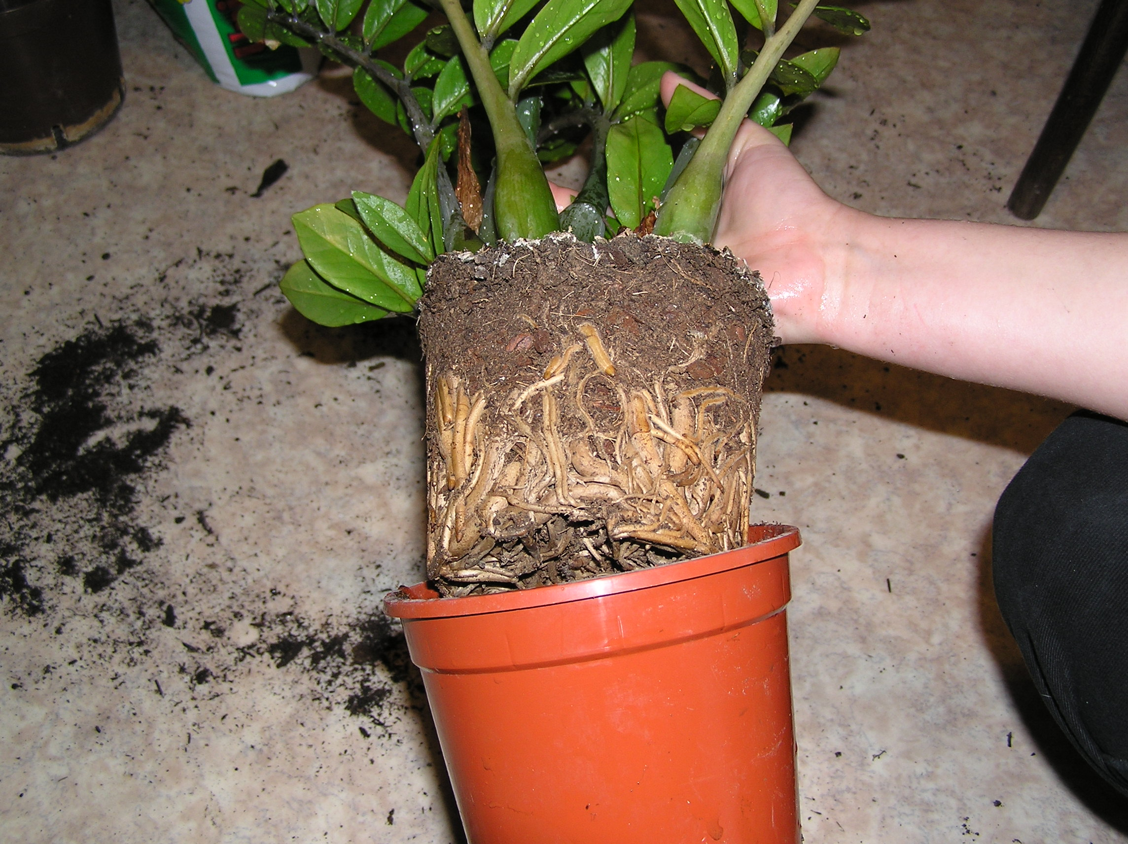 verwurzelter Boden einer Topfpflanze während des Umtopfens